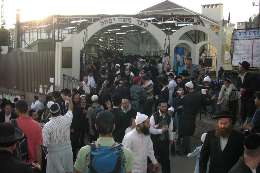 rabbi nahman tomb